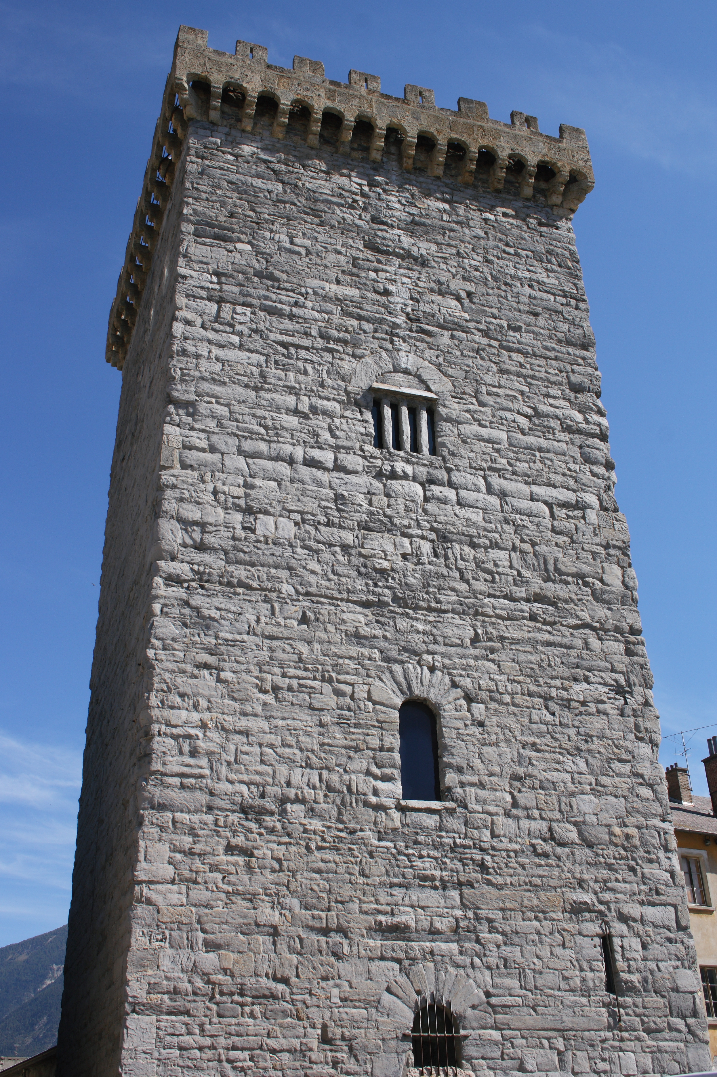 Tour Brune in Embrun, einer Gemeinde im Département Hautes-Alpes in der französischen Region Provence-Alpes-Côte d'Azur, aus dem 12. Jahrhundert, Teil des ehemaligen Bischofspalastes, Ansicht von Westen